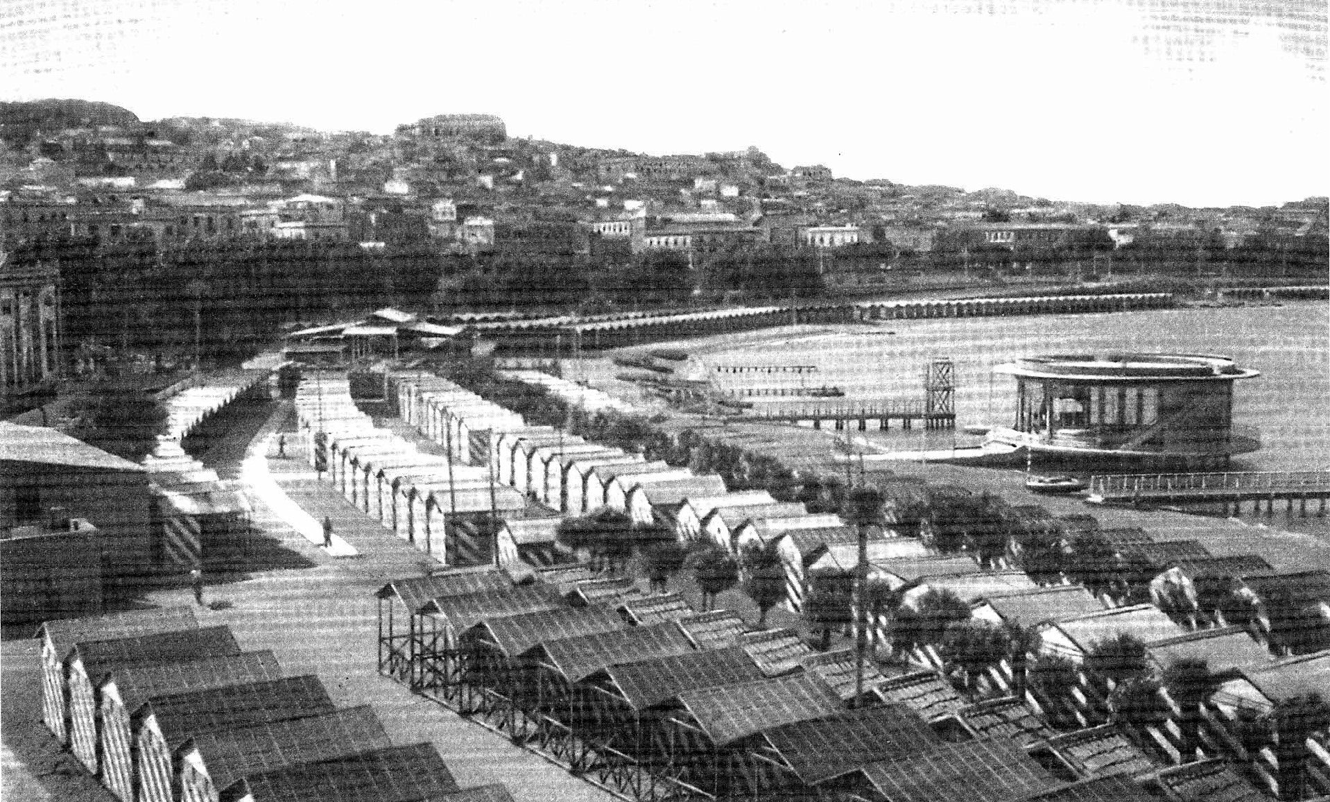 old postcard of Reggio Calabria